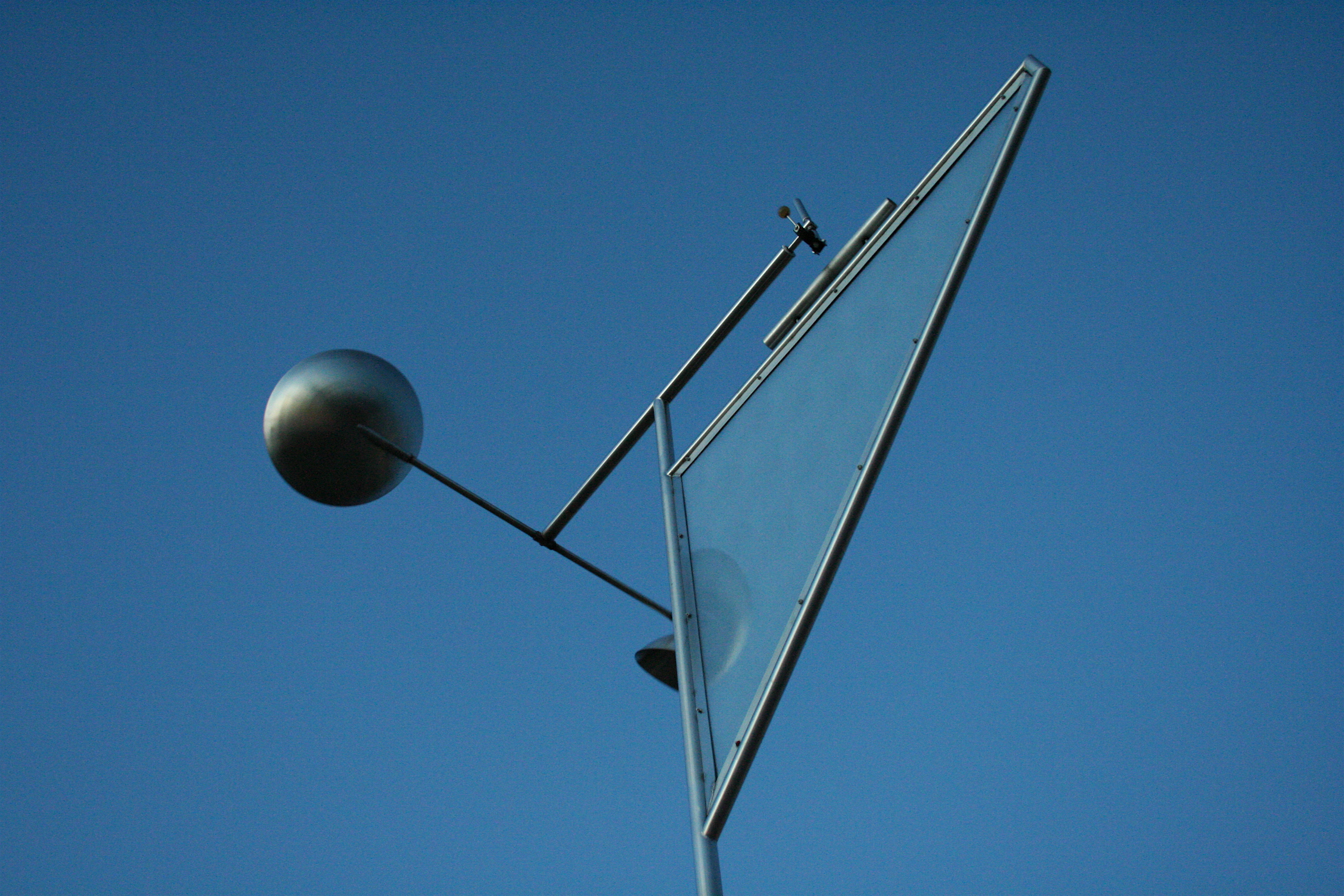 Meijer Gardens with Zen_Leo. w00t!